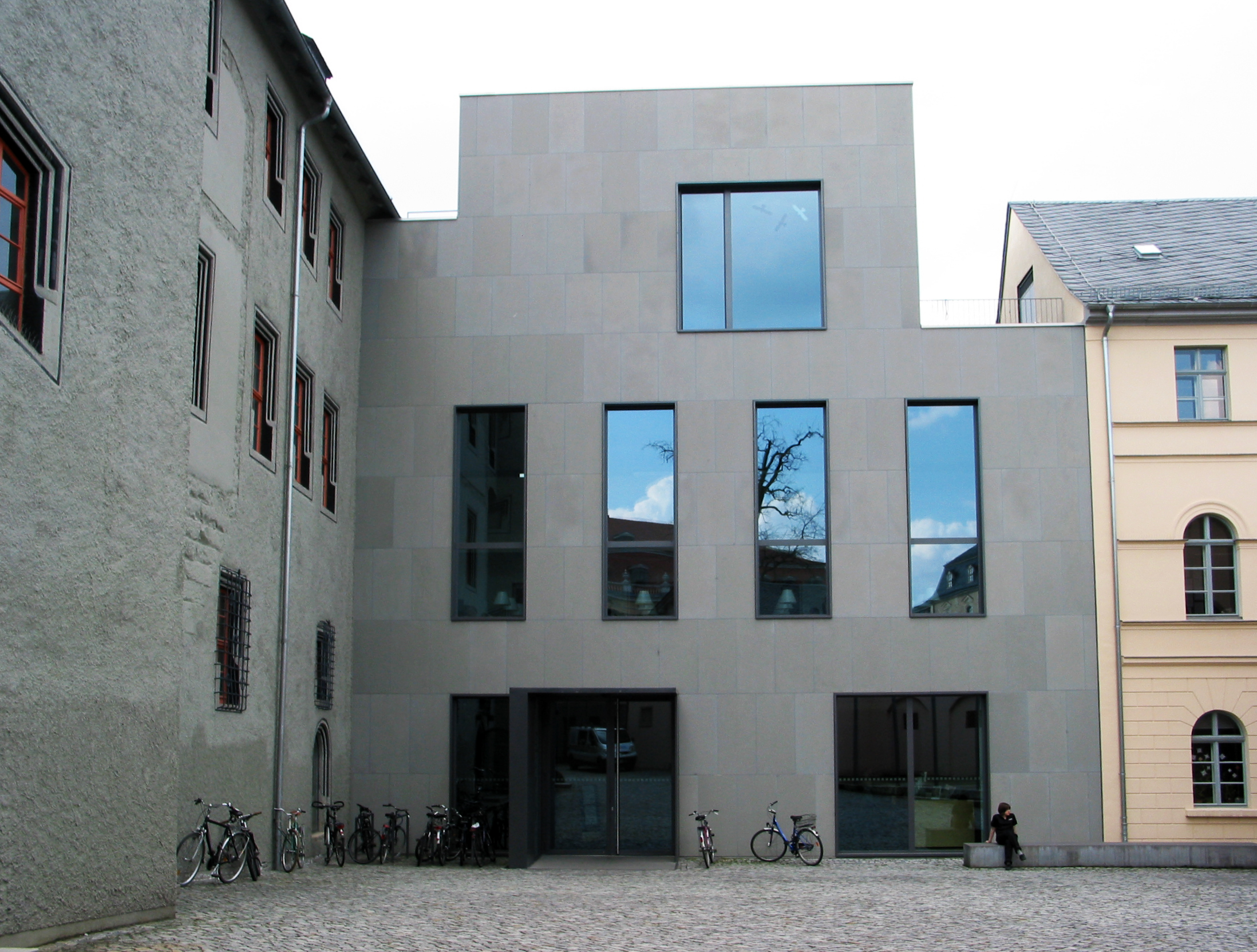 Südansicht des in das Gelbe Schloss integrierten neuen Studienzentrums der Herzogin-Anna-Amalia-Bibliothek in Weimar. Im Inneren befindet sich u.a. der Bücherkubus mit Lesesaal.